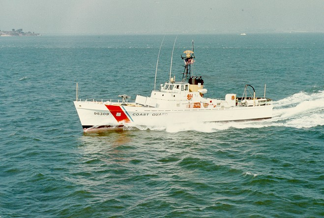 CGC Cape Carter (WPB-95309), no date.